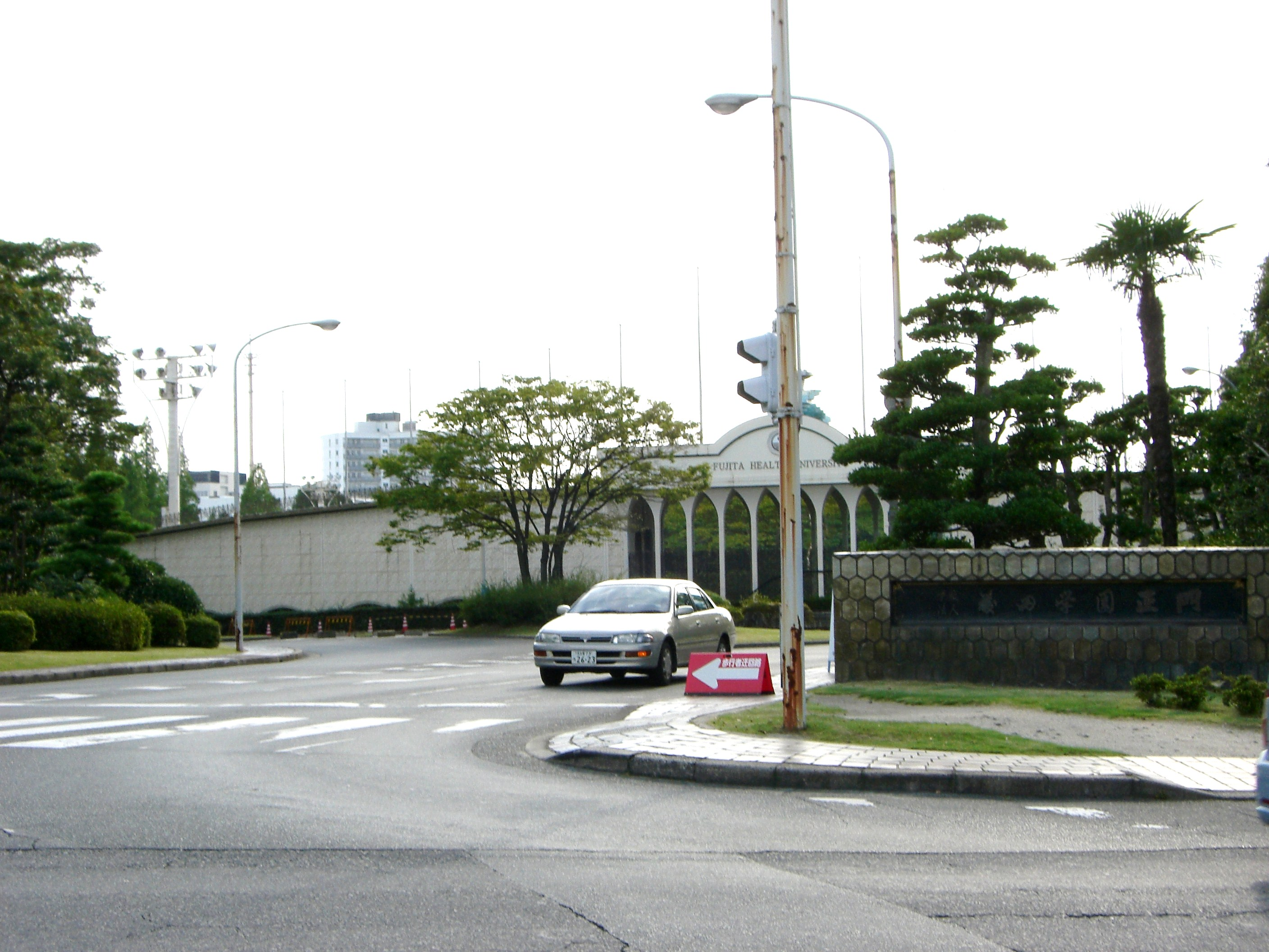 藤田学園正門